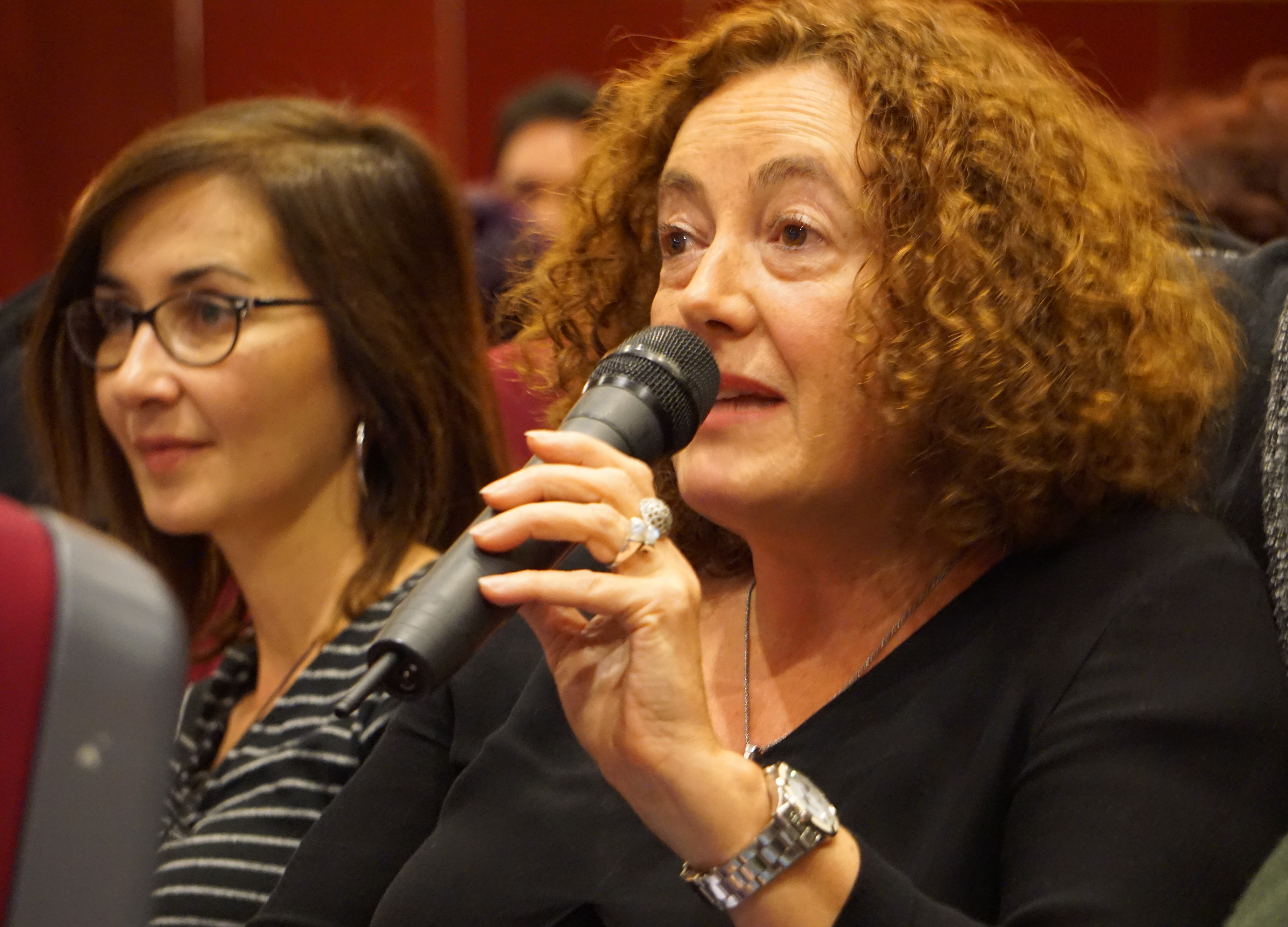 Feminario 2017 Córdoba